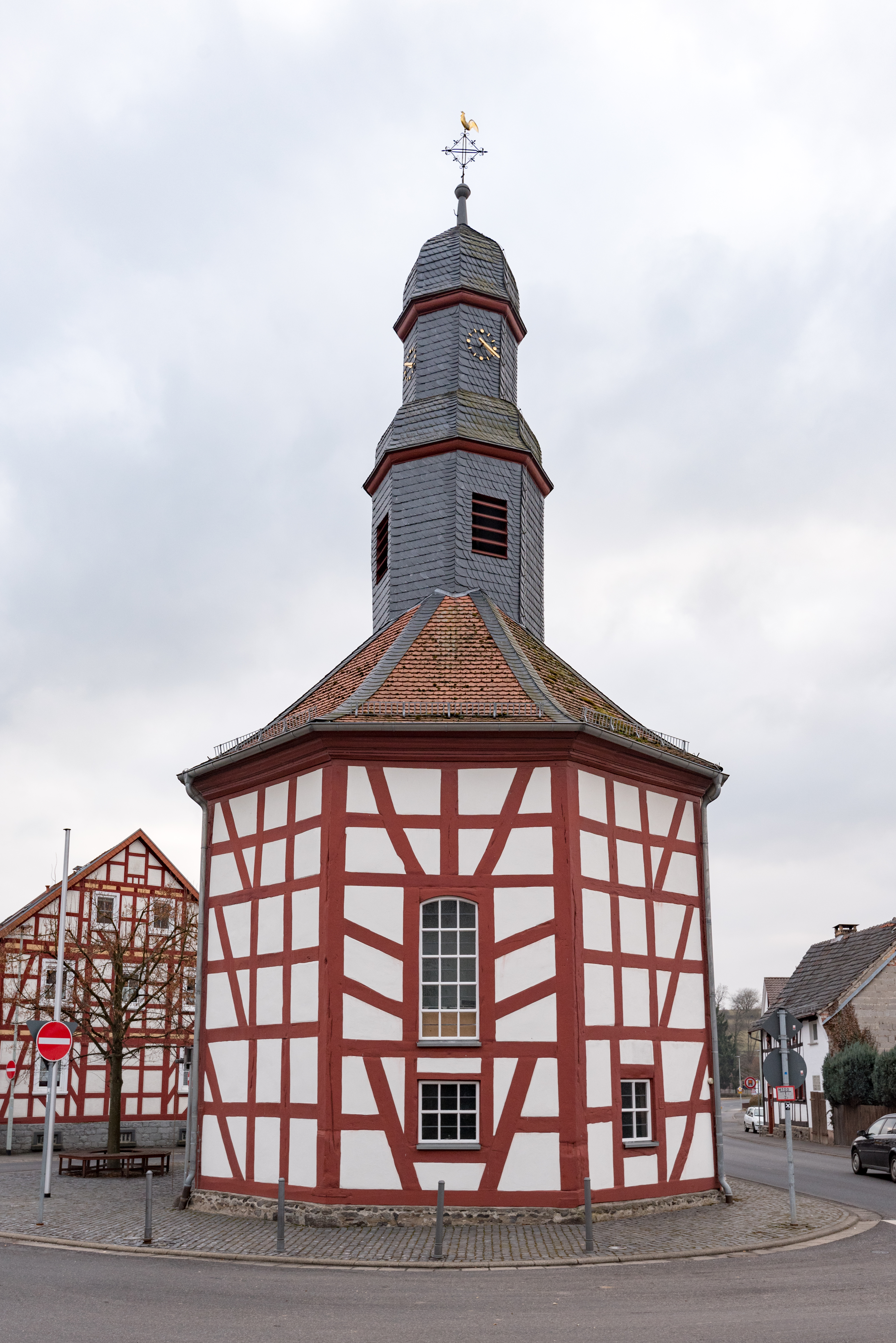 Mücke, Ruppertenrod, Unterdorf 2, Kirche